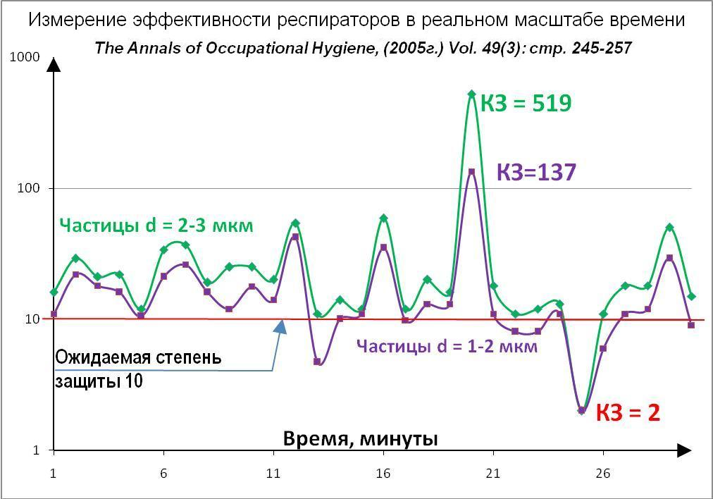 Это иллюстрация к статье об испытаниях респираторов в производственных условиях. Показаны результаты измерения эффктивности в реальном масштабе времени.